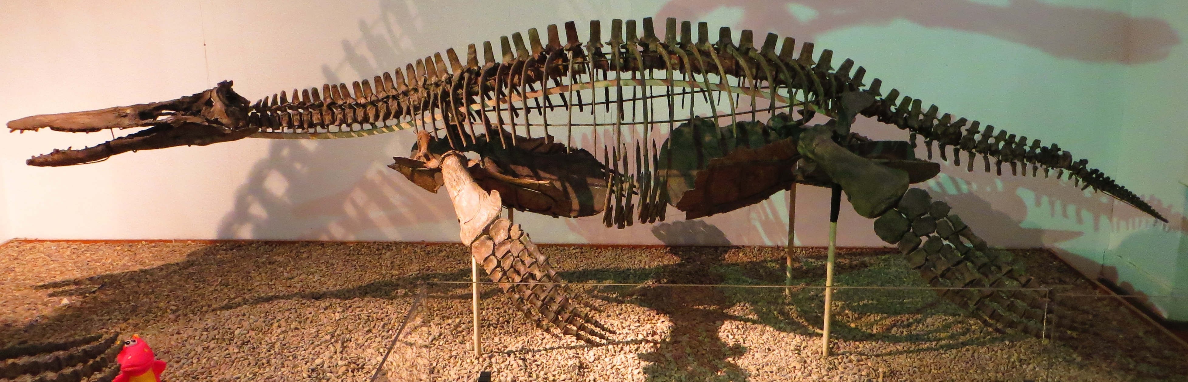 Fossil of Peloneustes, an extinct reptile - Took the picture at Museum of Paleontology, Tuebingen